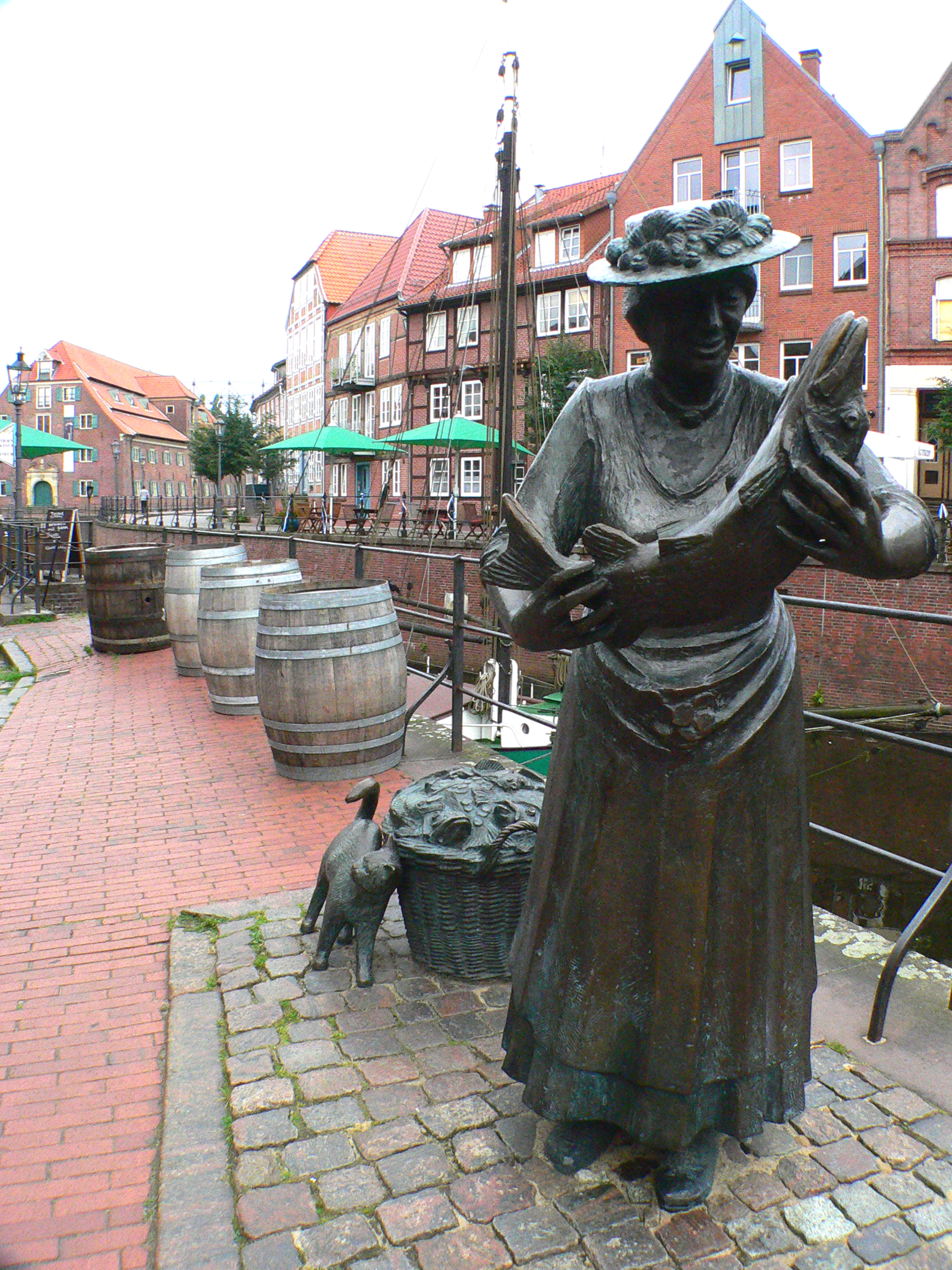 Bronzeplastik "Fischfrau" von F. Müller-Belecke in Stade (Deutschland) am Hansehafen.